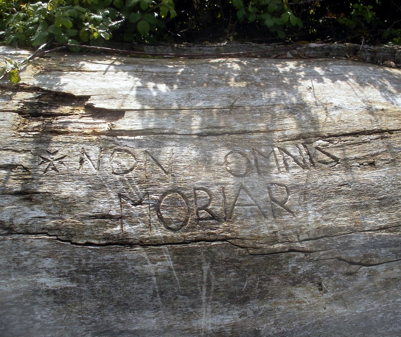 "I will not completely die". From Horace's poem (Odes, Bk III, xxx): "Non omnis moriar, multaque pars mei vitabit Libitinam. "